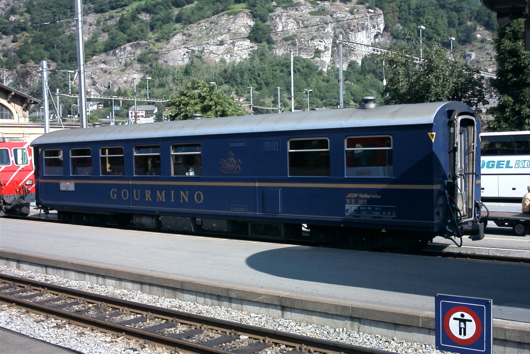 RhB WR 3811 steht in Brig bereit für den Glacier Express